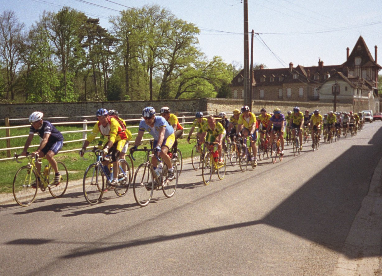 Peloton audax VVV